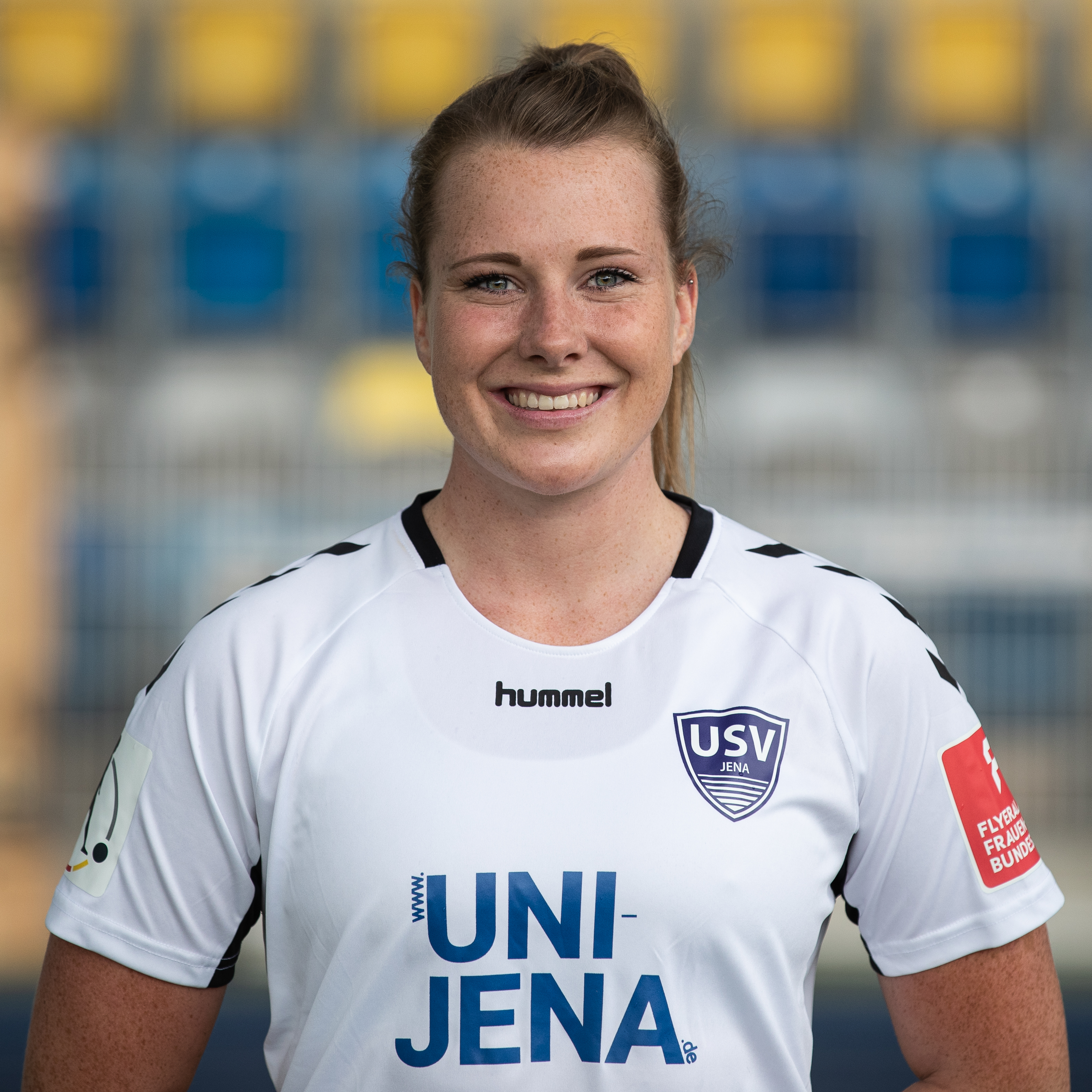 Fußball, Flyeralarm Frauen-Bundesliga, Mannschaftsfotos FF USV Jena; Anja Heuschkel (FF USV Jena, 14); Porträt, Einzelbild